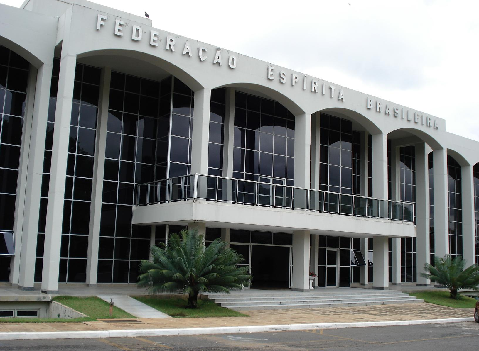 Entrée principale de la Fédération Spirite Brésilienne (Brasilia). 2006